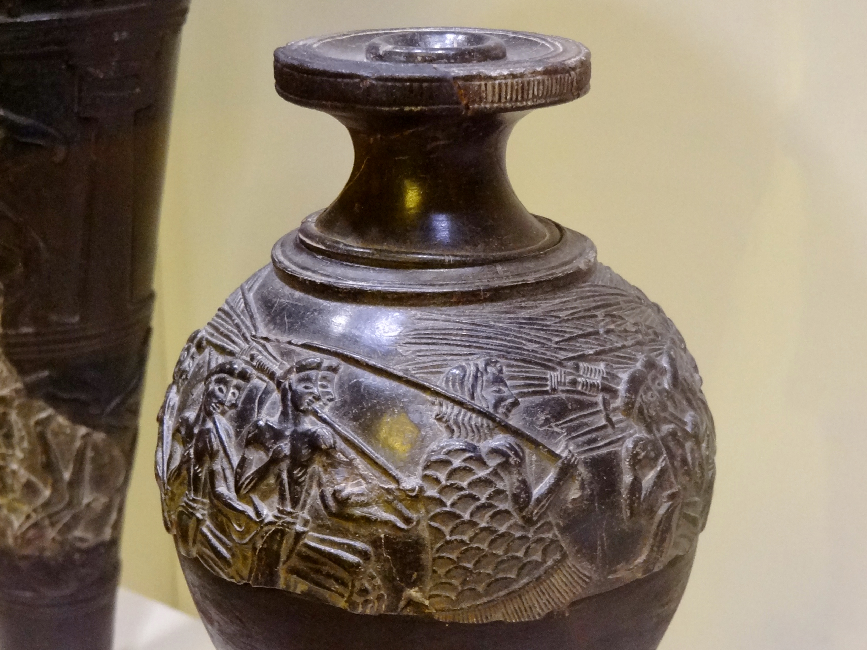 „Schnittervase“, Reliefrhyton aus Speckstein (Neupalastzeit 1500–1450 v. Chr.) aus Agia Triada, ausgestellt im Archäologischen Museum Iraklio, Kreta, Griechenland